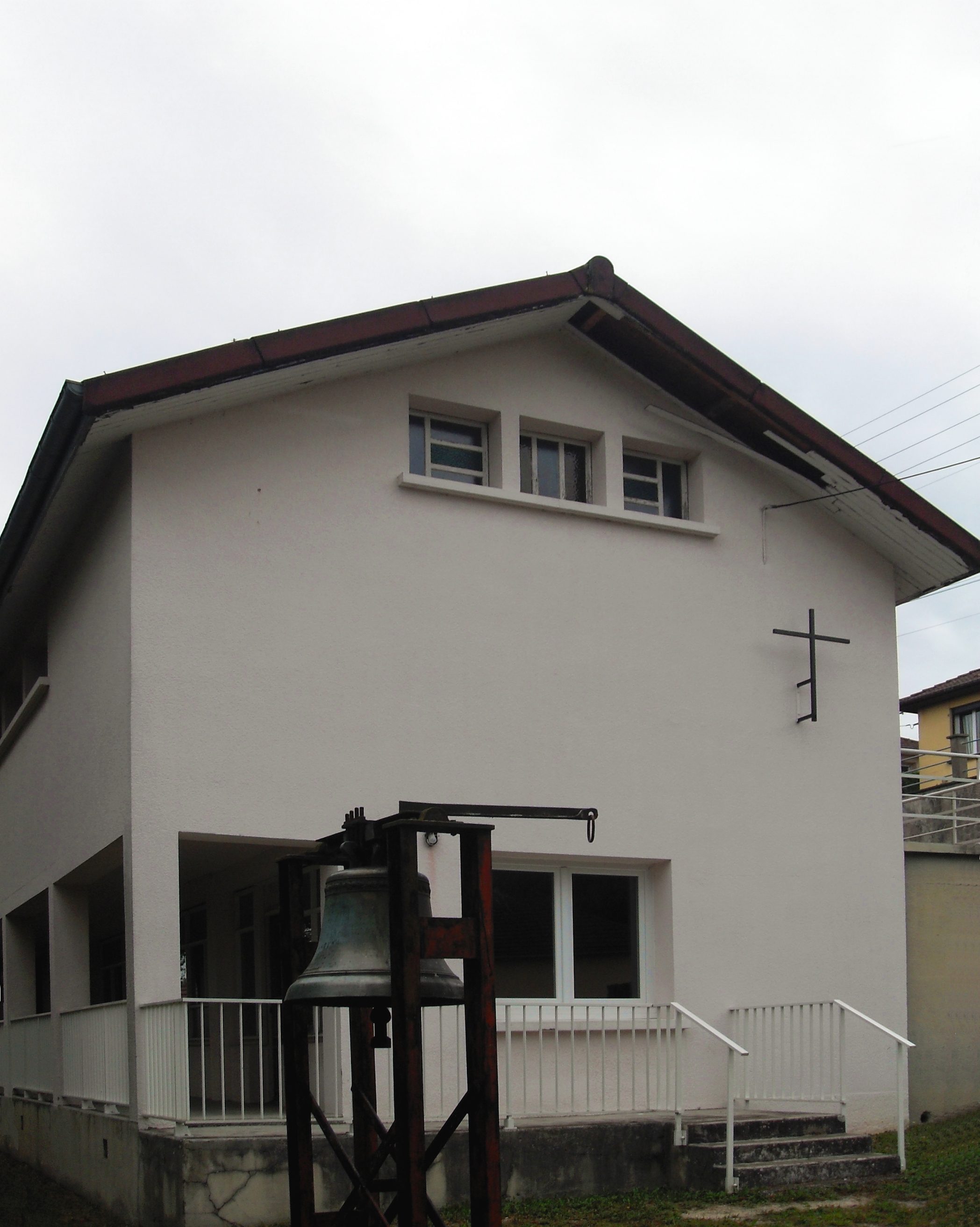 La chapelle de Dung avec cadre de cloche séparée